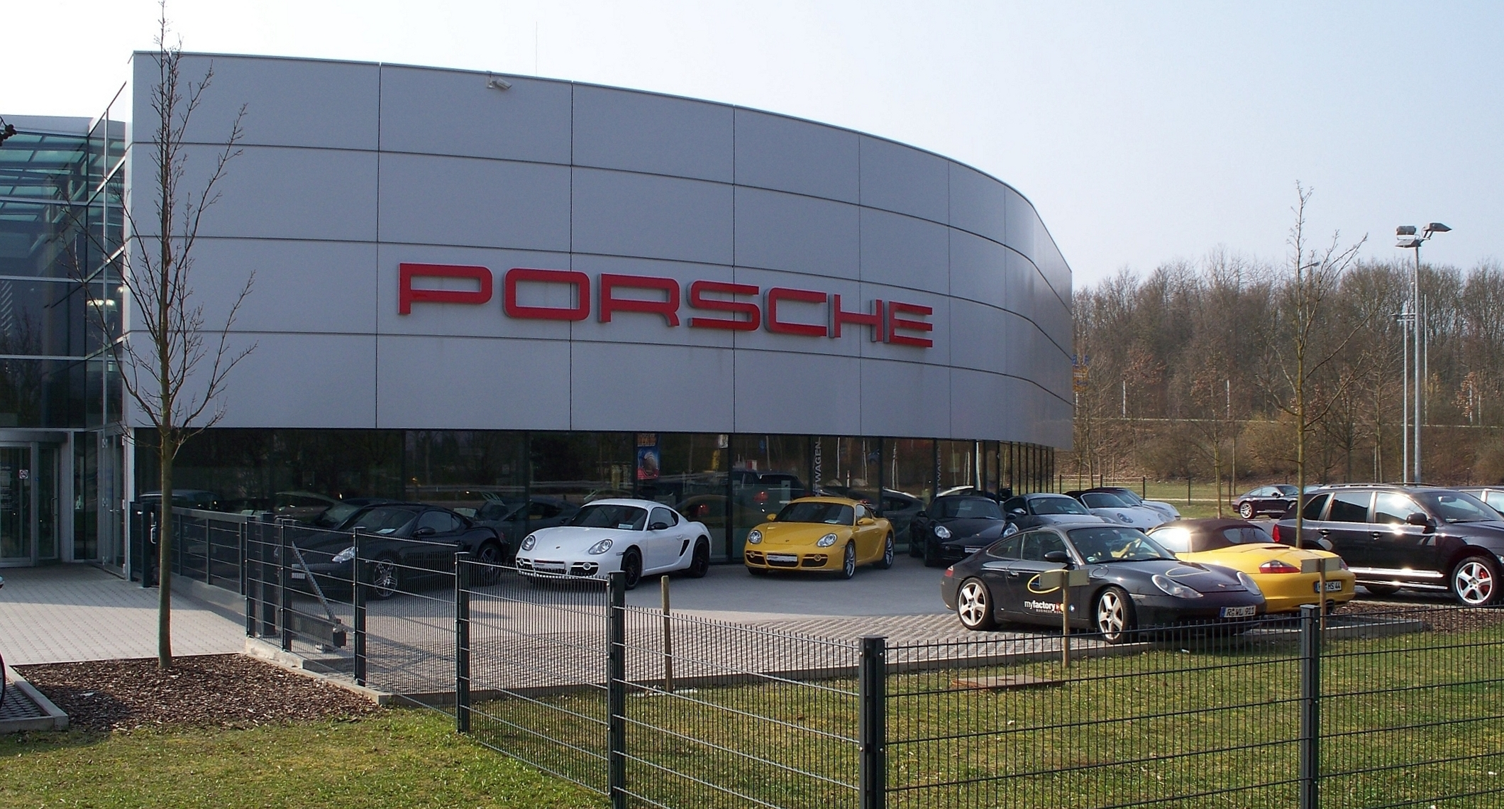 Porsche-Händler in Regensburg.